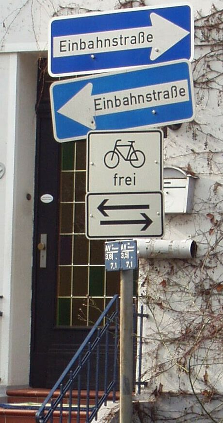 Verkehrsschild (Dieses scheinbar absurde Schild steht in Bremen an einer T-Kreuzung, die Straße ist jeweils nach rechts bzw. links Einbahnstraße, also in der Richtung "vom Schild weg", Radfahrer dürfen in alle Richtungen fahren)